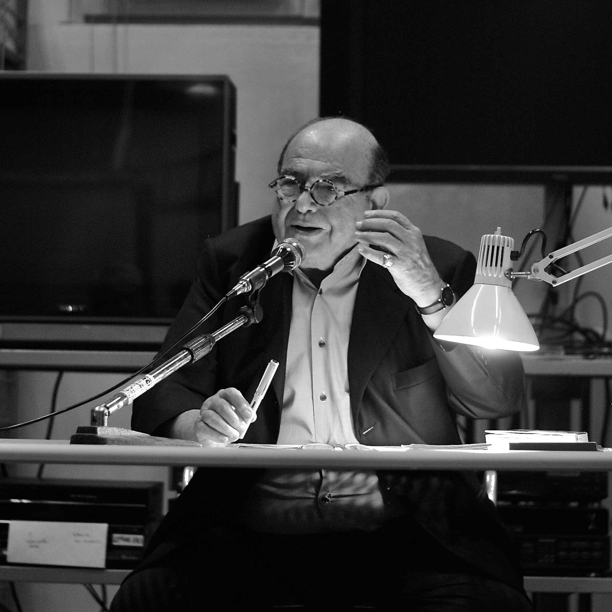 Lo scrittore e musicologo Paolo Terni ritratto il 9 novembre 2013 durante la conferenza "Non senza fatiga si giunge al fine: il Ricercare nelle prime musiche europee" presso la biblioteca "A.Gentilucci" di Reggio Emilia.